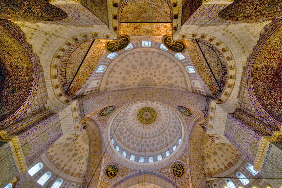 Valide Sultan Camisi tavanı.